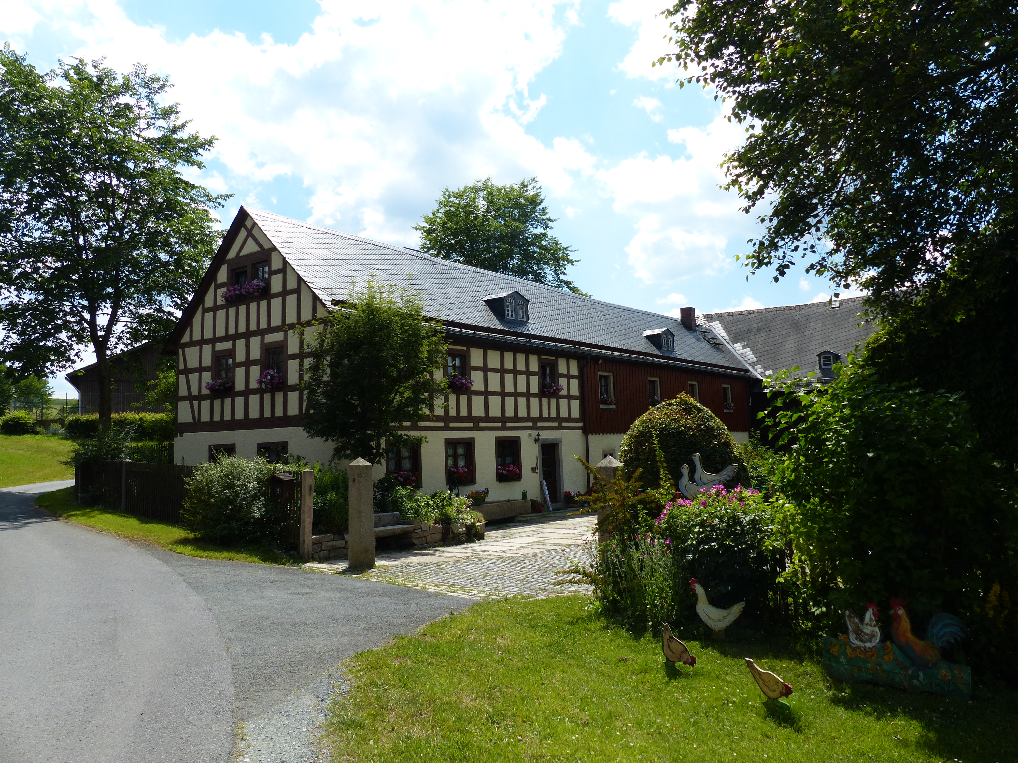 Ansicht von Langenbach, Ortsteil von Schwarzenbach an der Saale